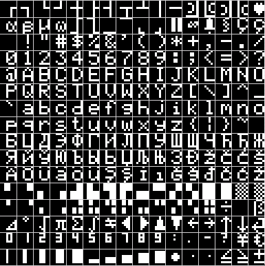 Darstellung eines Zeichengenerator-ROM Inhaltes mit kyrillischen und lateinischen Zeichen sowie Sonderzeichen